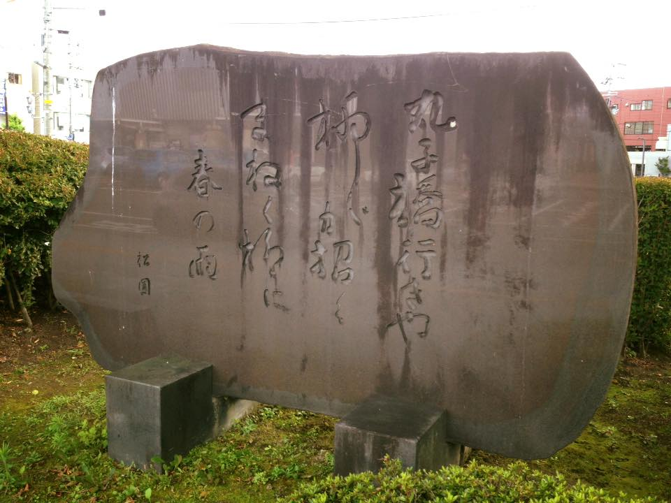 「丸子橋ゆきゃ 柳が招く 招く柳に春の雨 松圃」